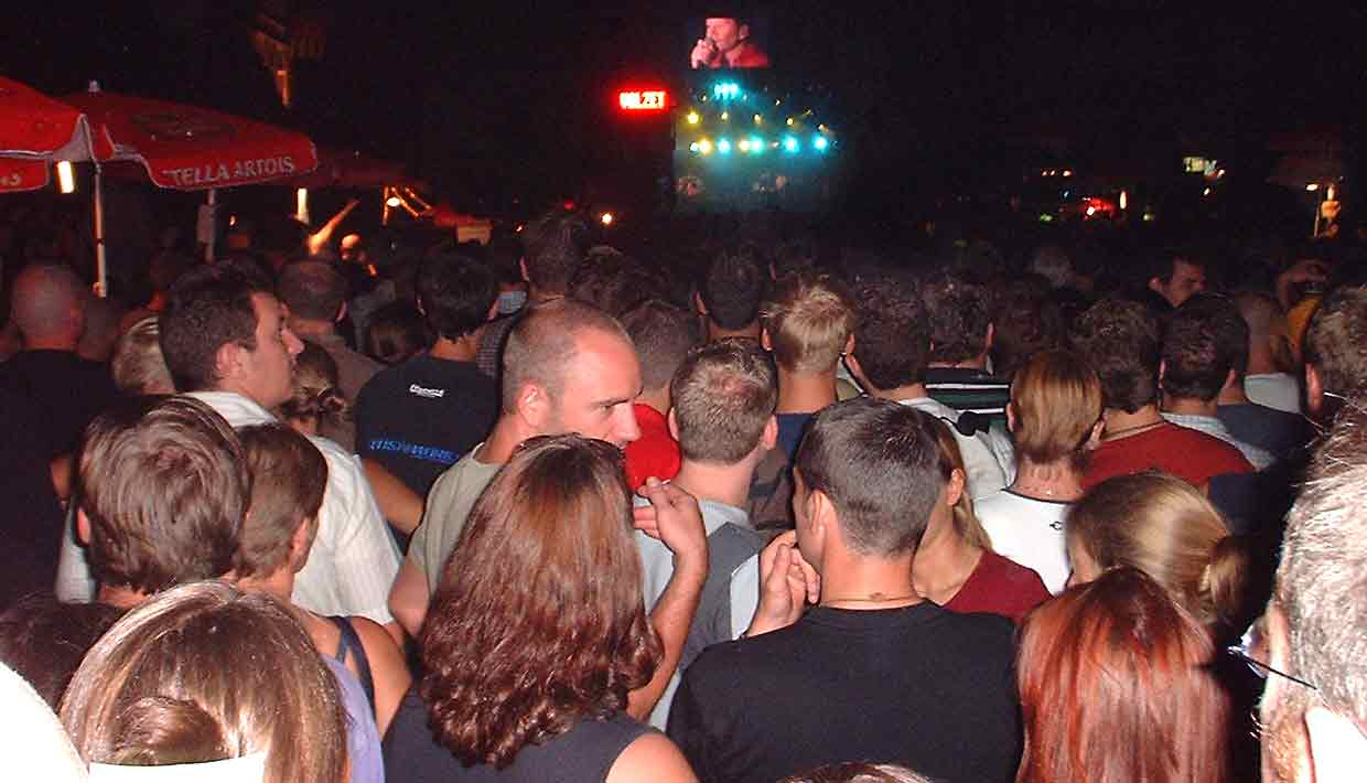 Foto genomen op de Oude Markt in Leuven tijdens het optreden van de Simple Minds op het Martrock festival in 2000.